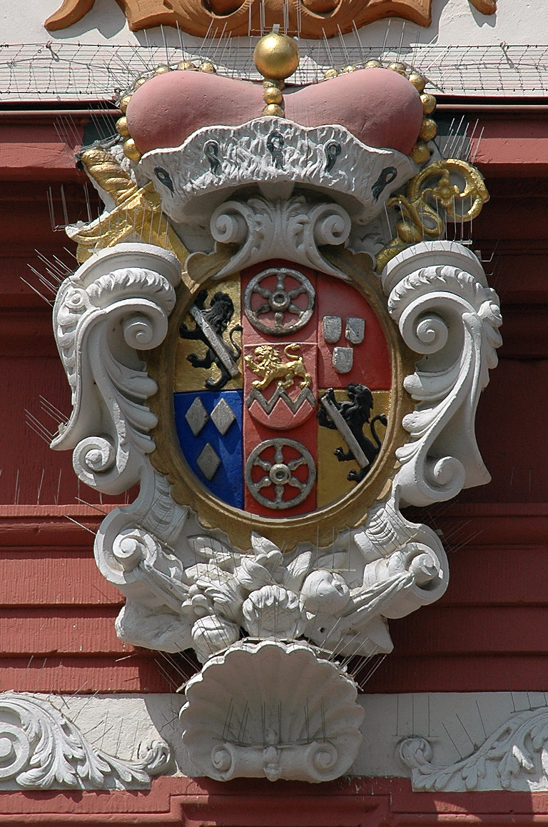 Wappen des Mainzer Bischofs Lothar Franz von Schönborn an der Kurmainzischen Statthalterei (zwischen 1711 und 1720 errichtet), heute Thüringer Staatskanzlei in der Regierungsstraße in Erfurt